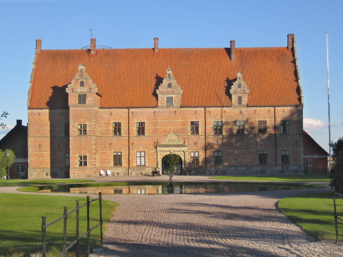 Svenstorps slott. Bilden tagen av mig själv 17 september 2005.